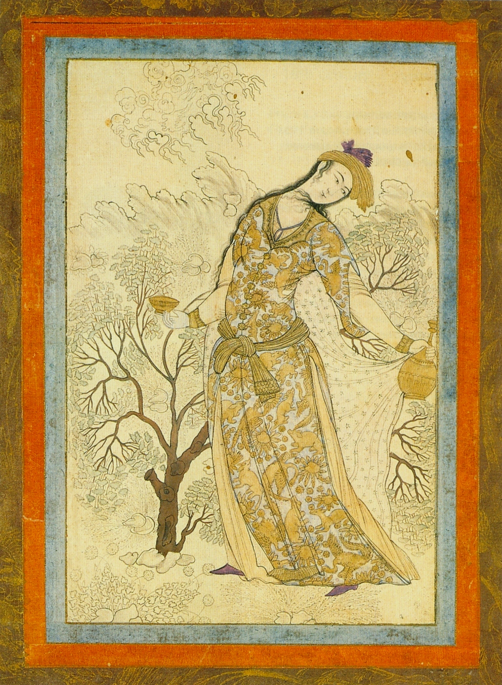 Женщина с кувшином и чашей 2я пол 18в эрмитаж